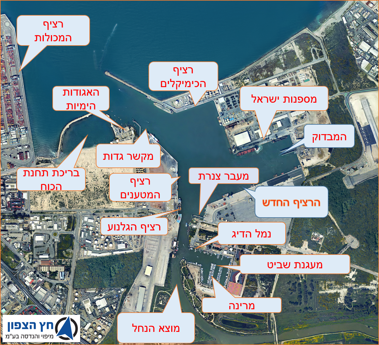 המשתמשים בנמל הקישון ומוצא הנחל אל הים